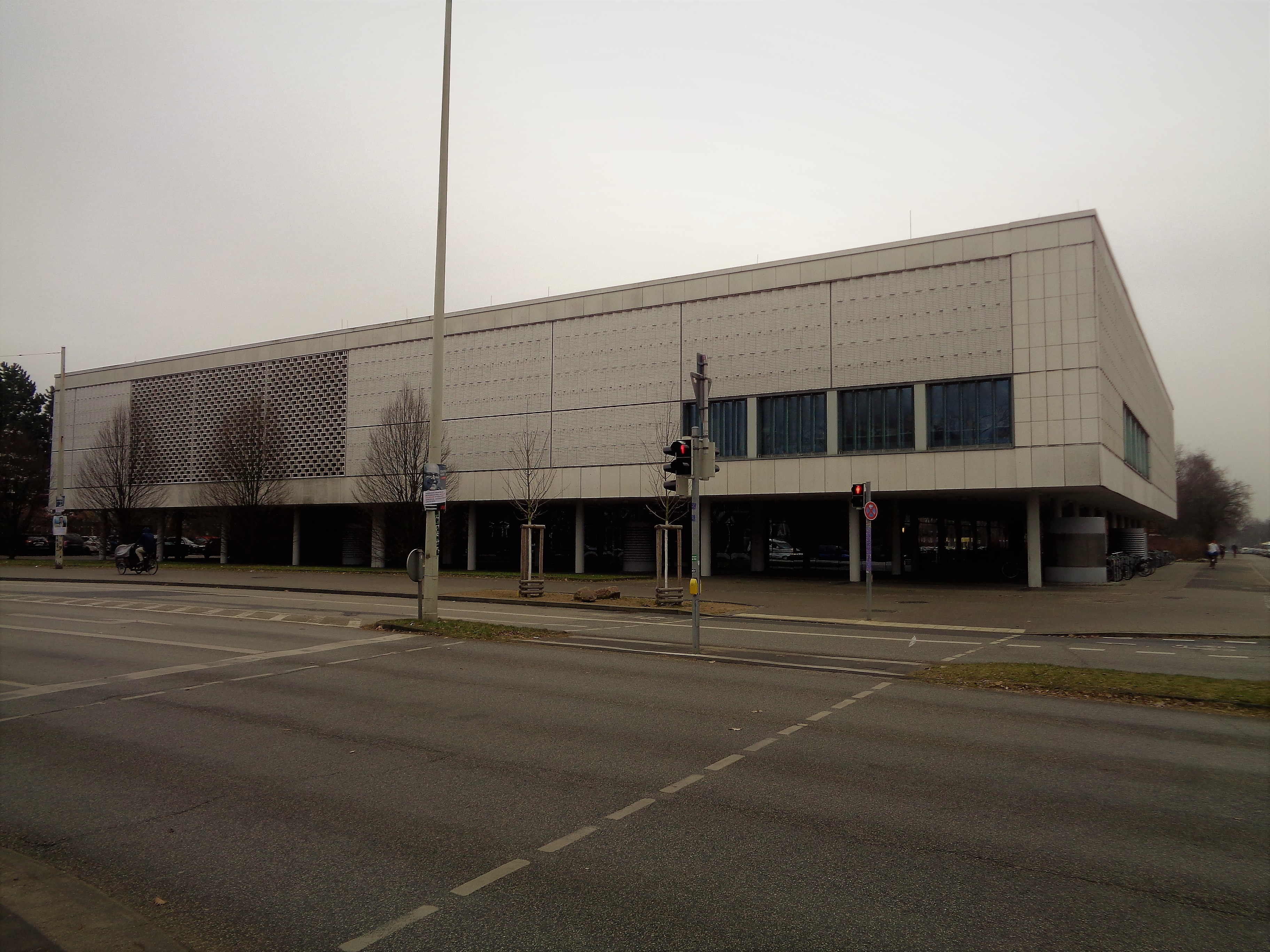 In diesem Gebäude im Kieler Stadtteil Ravensberg war von 1966 bis 2001 die Universitätsbibliothek Kiel untergebracht.